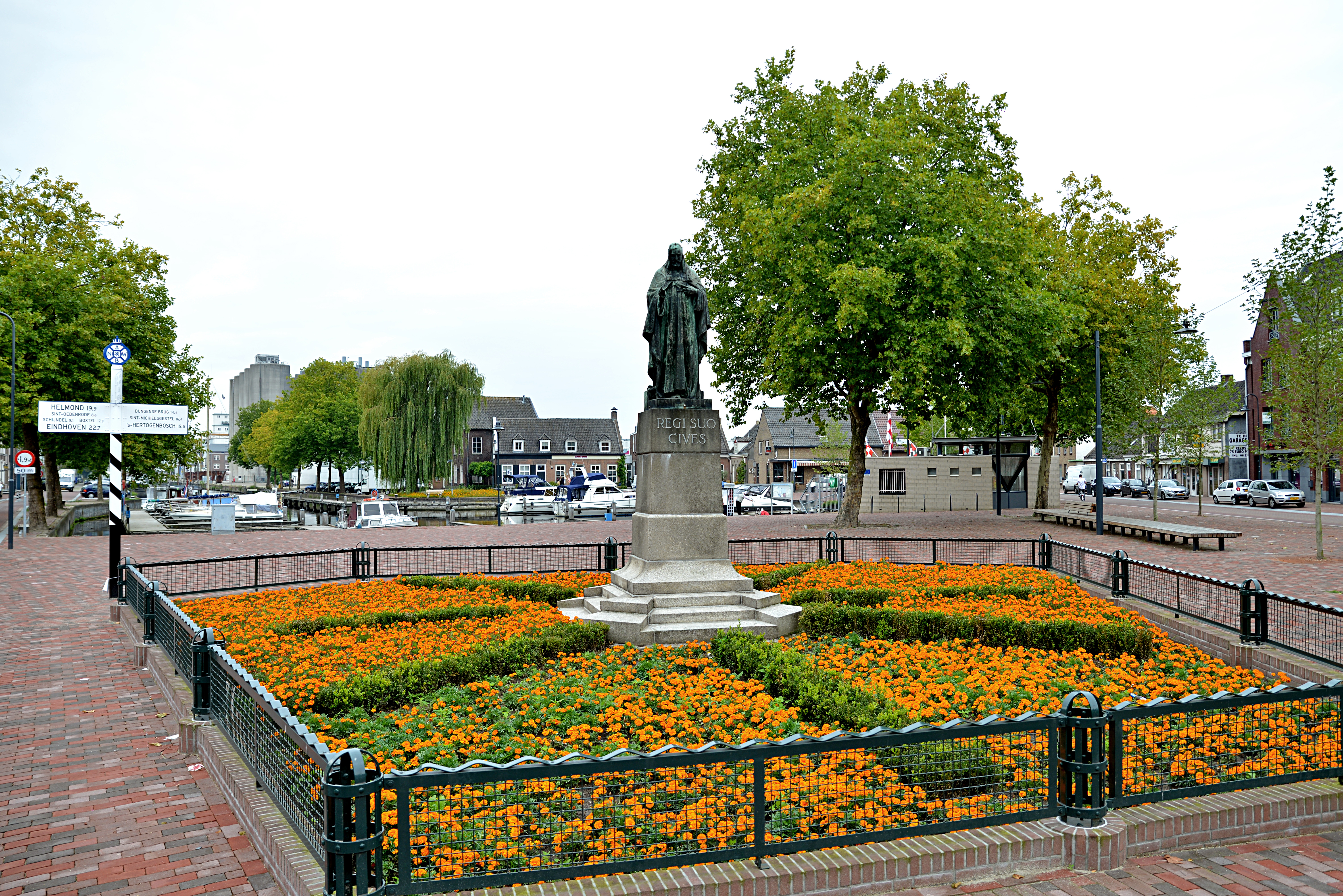 Beeld van het Heilig Hart op het Heilig Hartplein in de binnenhaven (oude haven) van Veghel. Zie ook: Heilig Hartbeeld (Veghel)